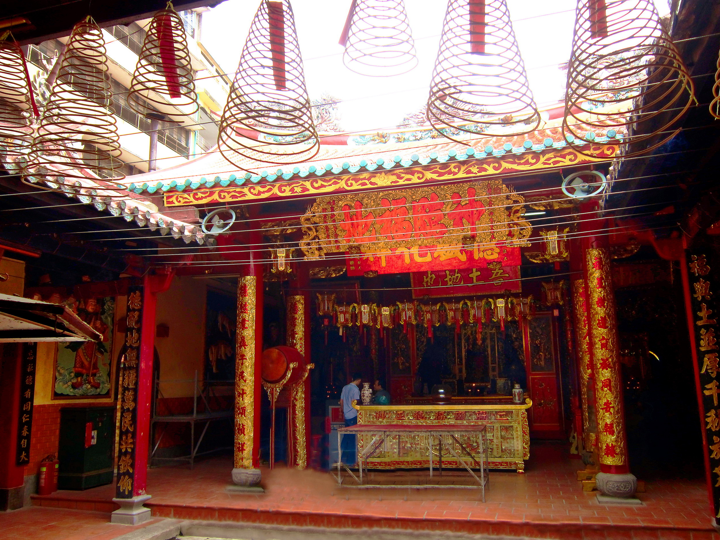 Miếu Nhị Phủ là một ngôi miếu cổ do người Hoa xây dựng vào khoảng đầu thế kỷ 18. Hiện ngôi miếu tọa lạc tại số 264 đường Hải Thượng Lãn Ông, phường 14, quận 5, Thành phố Hồ Chí Minh, Việt Nam.